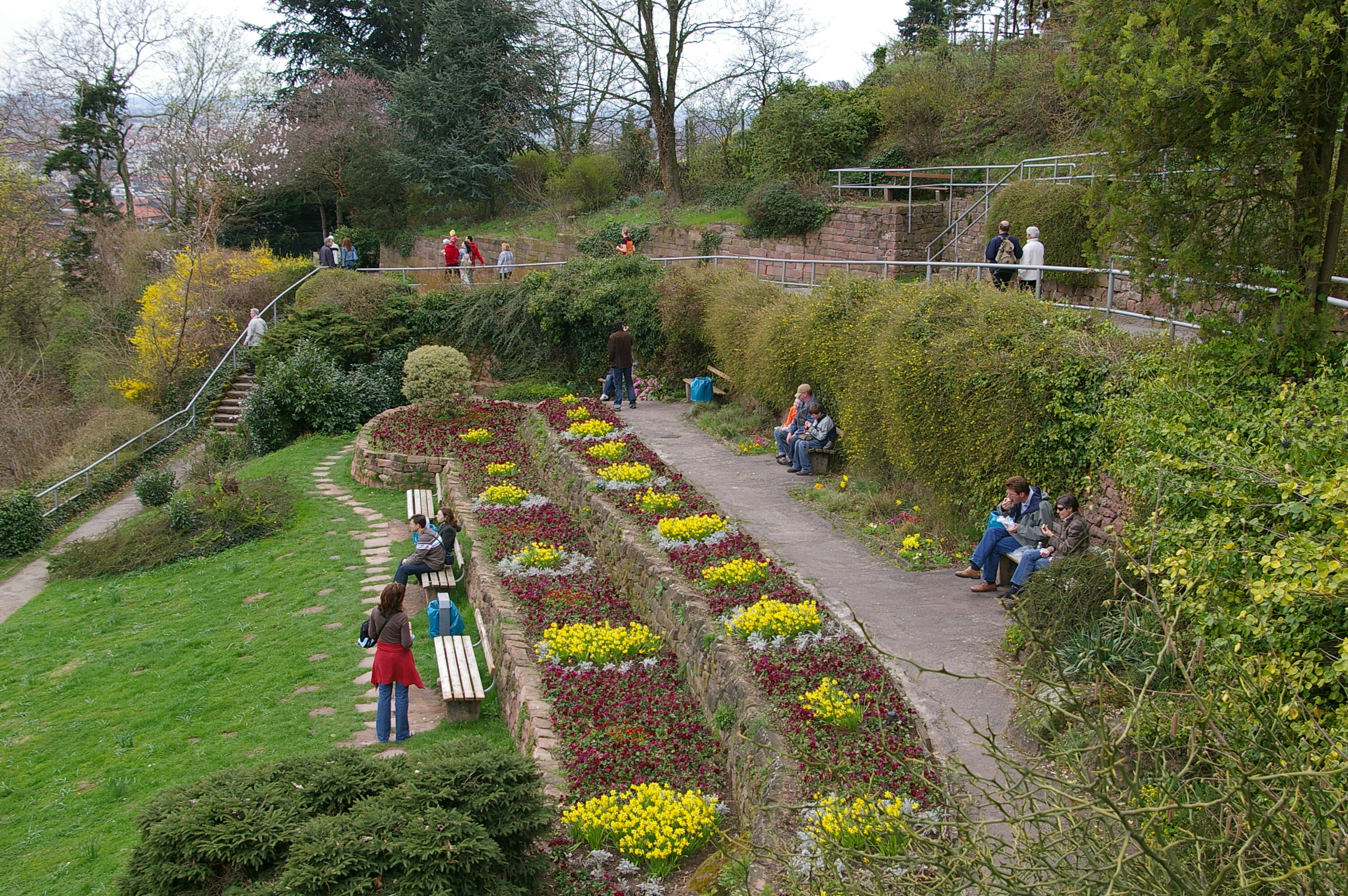 Gärten am Philospohenweg